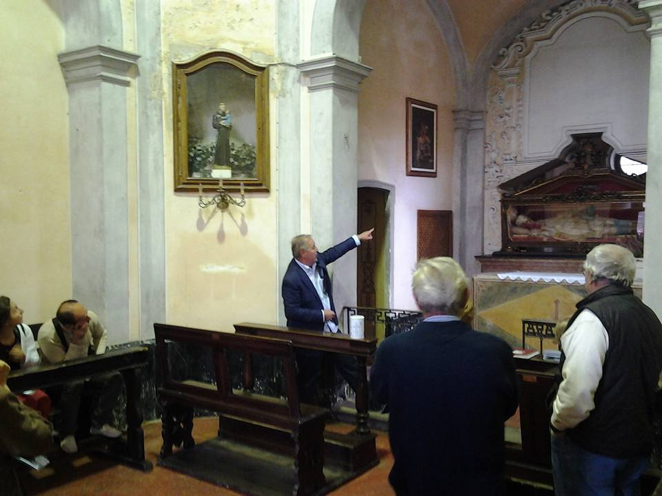 Egidio Passoni